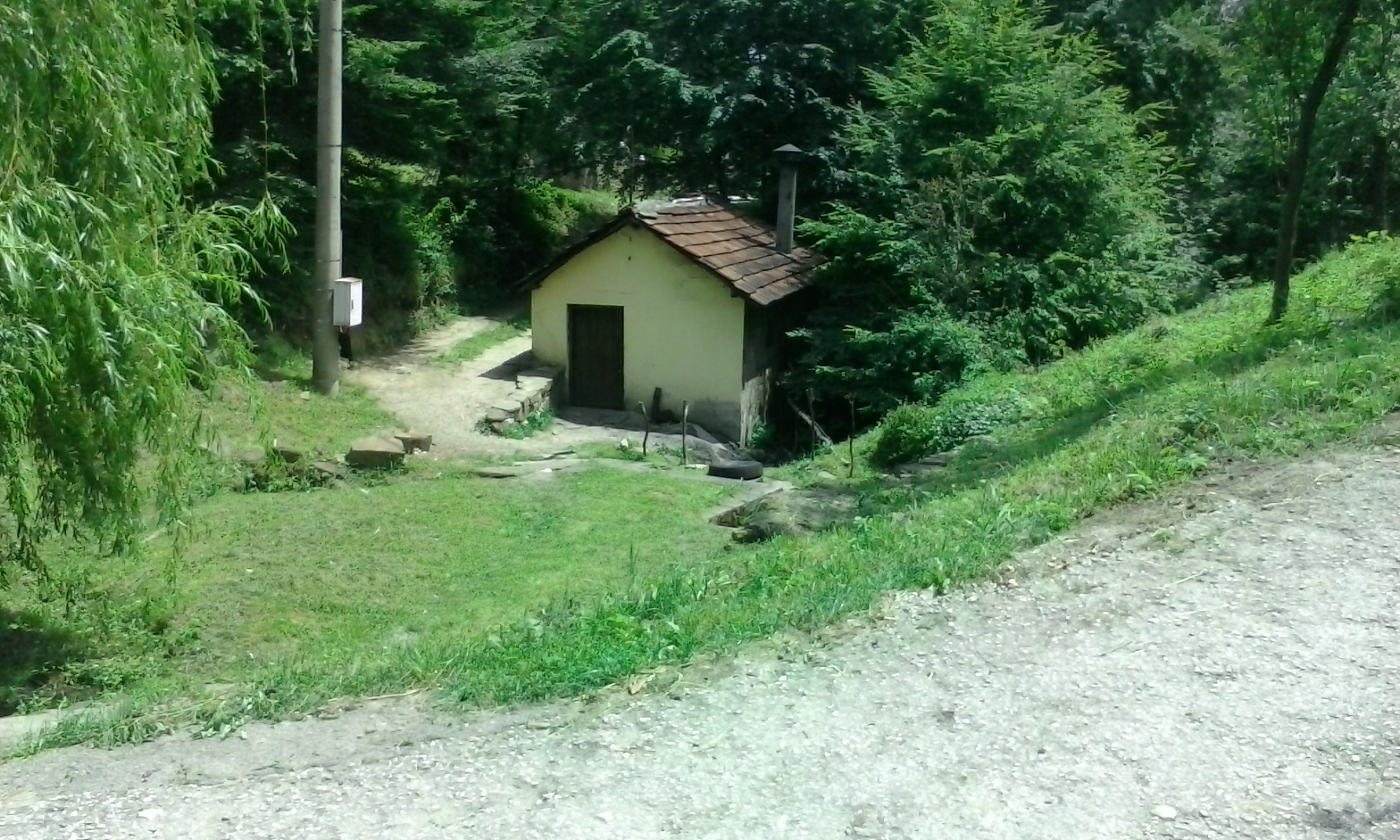 Веленци - ракиджийницата